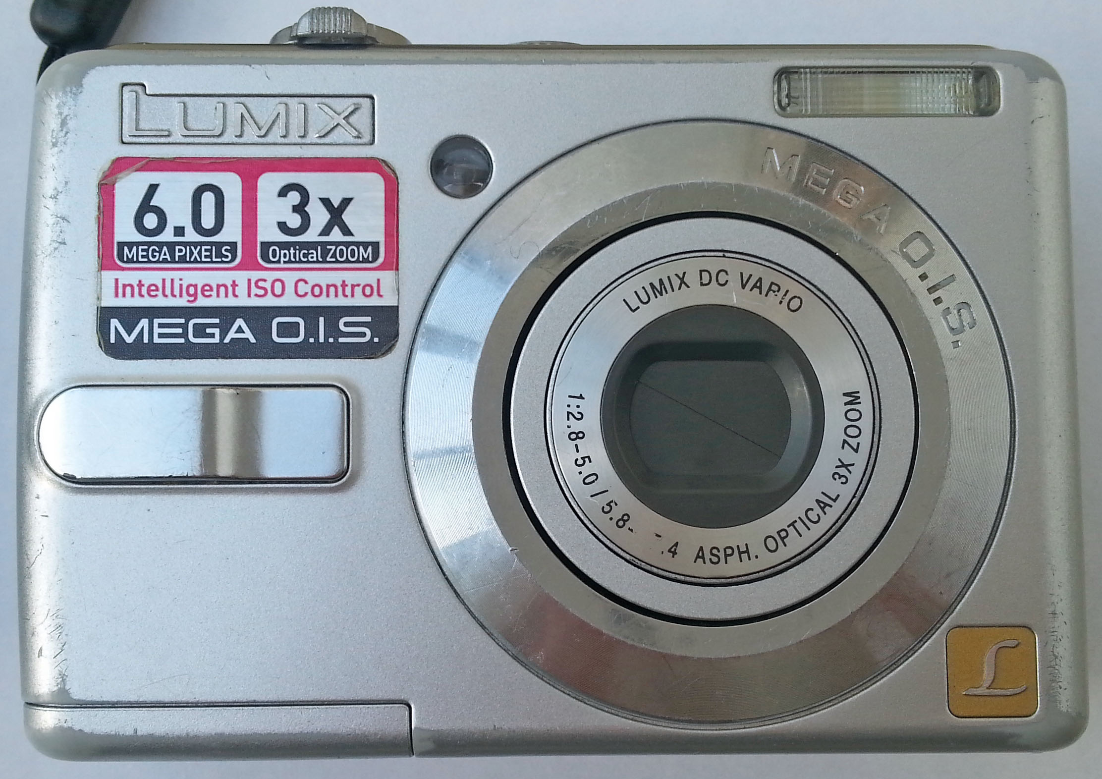 APN PANASONIC DMC-LS60